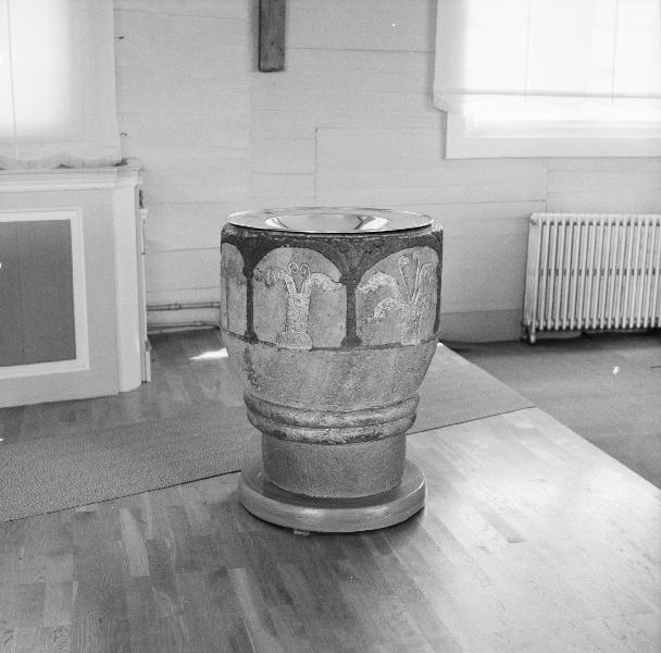 Dopfuntscuppa av kalksten, delvis från 1100-talet. Kategori: (04) Dopfuntar Dopfuntscuppa av kalksten, delvis från 1100-talet.